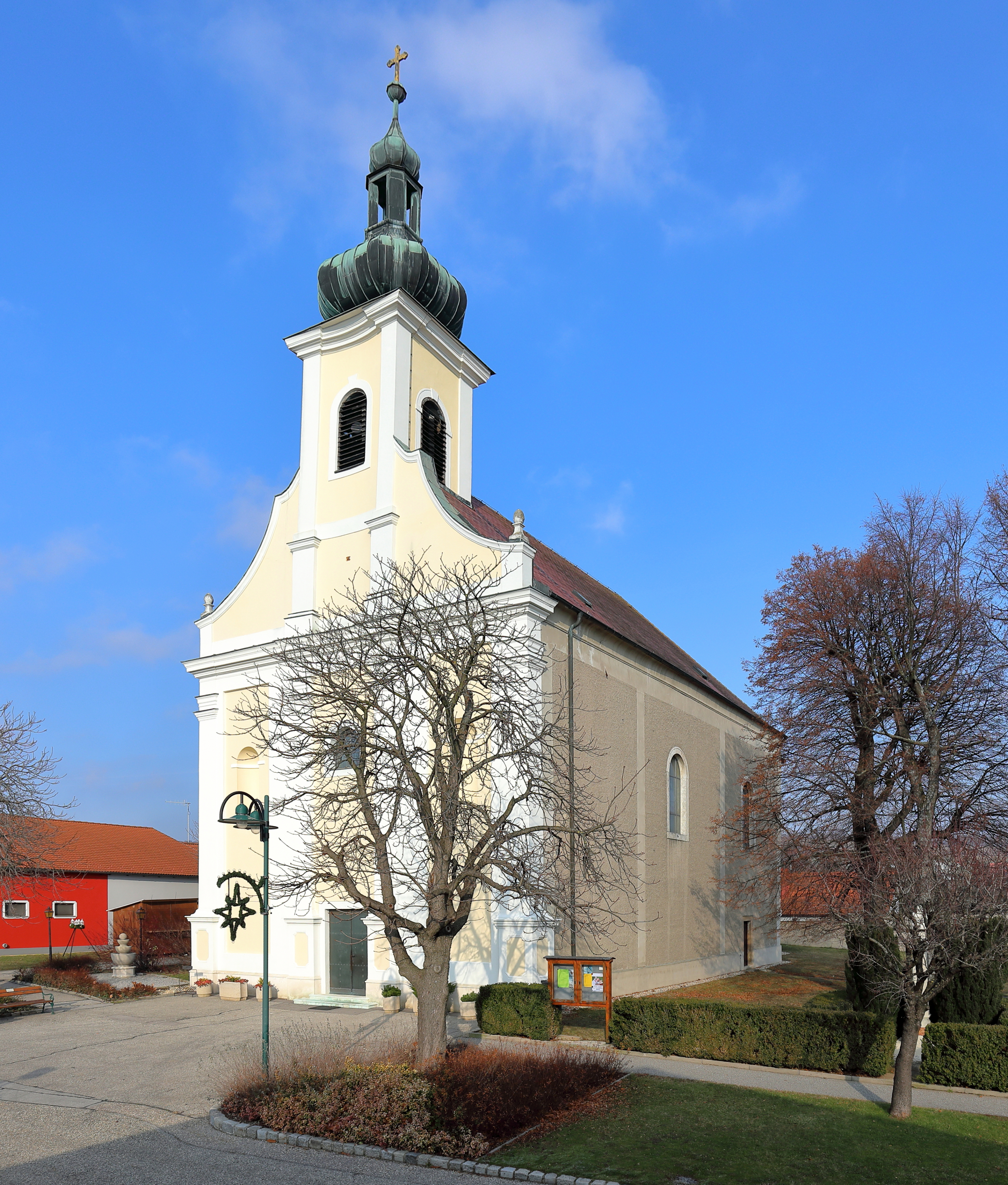 Südansicht der röm.-kath. Pfarrkirche hl. Stephan, König von Ungarn in der burgenländischen Gemeinde Edelstal. Die Saalkirche mit eingezogenem, flach geschlossenem Chor wurde 1740 errichtet.